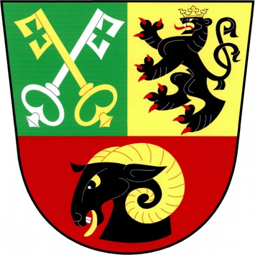 znak, Jinošov, okres Třebíč